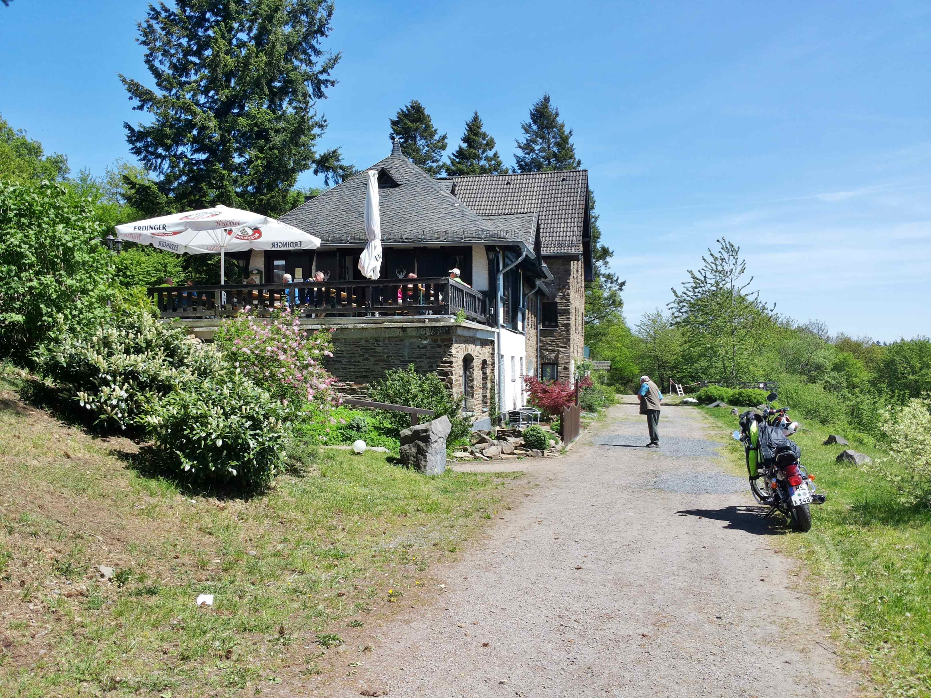 Landgasthof Steinerberghaus auf dem Steinerberg oberhalb von Kesseling, ursprünglich eine Wanderhütte des Eifelvereins